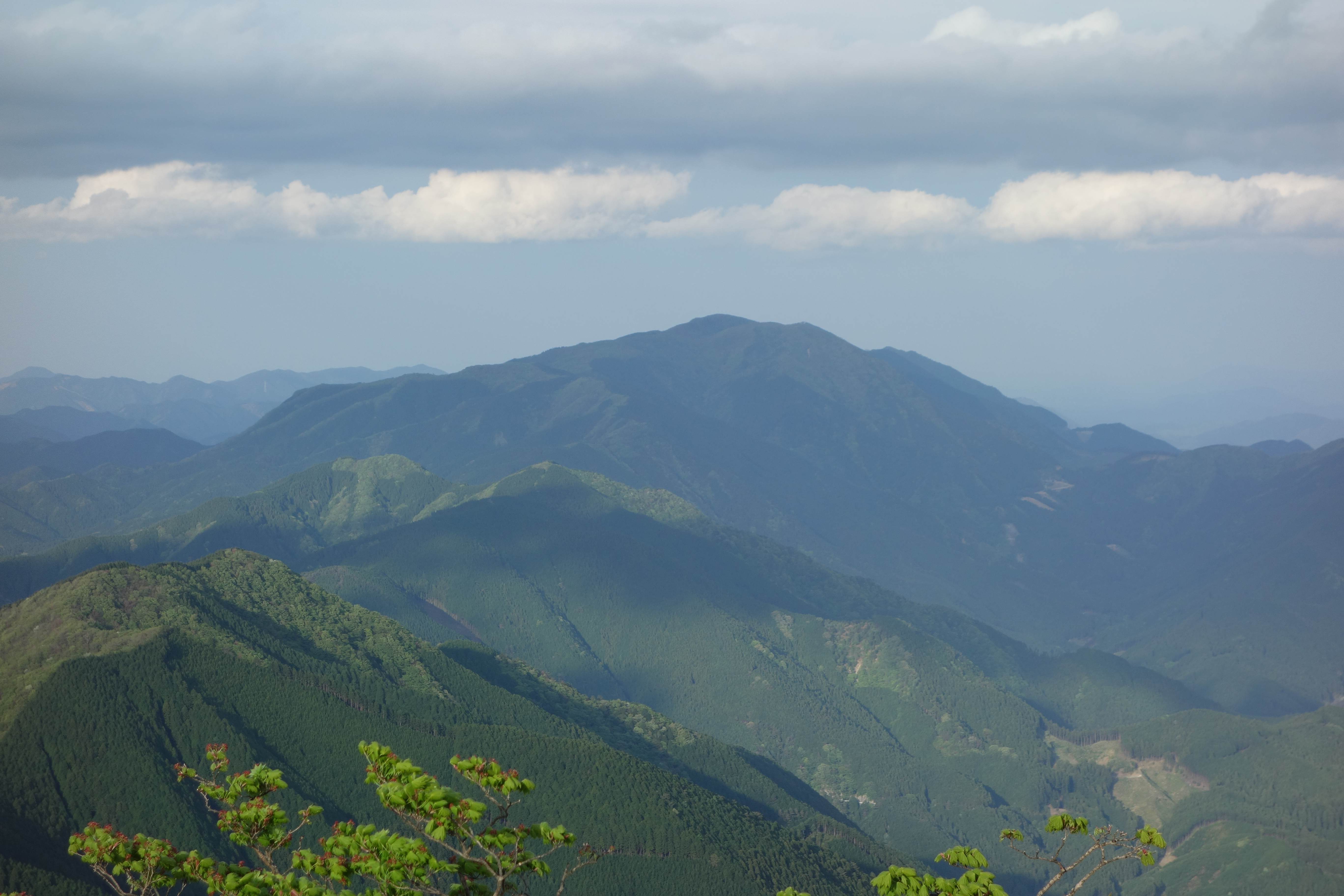 高見山から見た三峰山